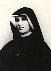 Fotografia św. Faustyny Kowalskiej